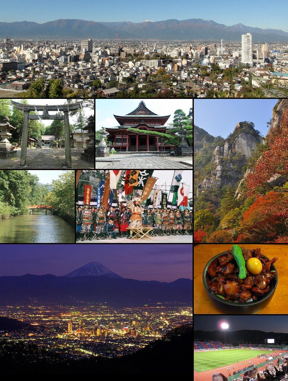 File:Minami-Alps and Kofu town.jpg File:Sakaorimiya zenkei.jpg File:Kai-Zenkoji-temple Kofu-city Yamanashi Japan.JPG File:Kakuenpou in autumn.jpg File:躑躅ヶ崎館.jpg File:Shingenko syutsujin.jpg File:The night view of Kofu City.jpg File:Kōfu Torimotsuni.jpg File:Vfk2009112101.jpg 以上９画像を使用しUser:Halowandが作成